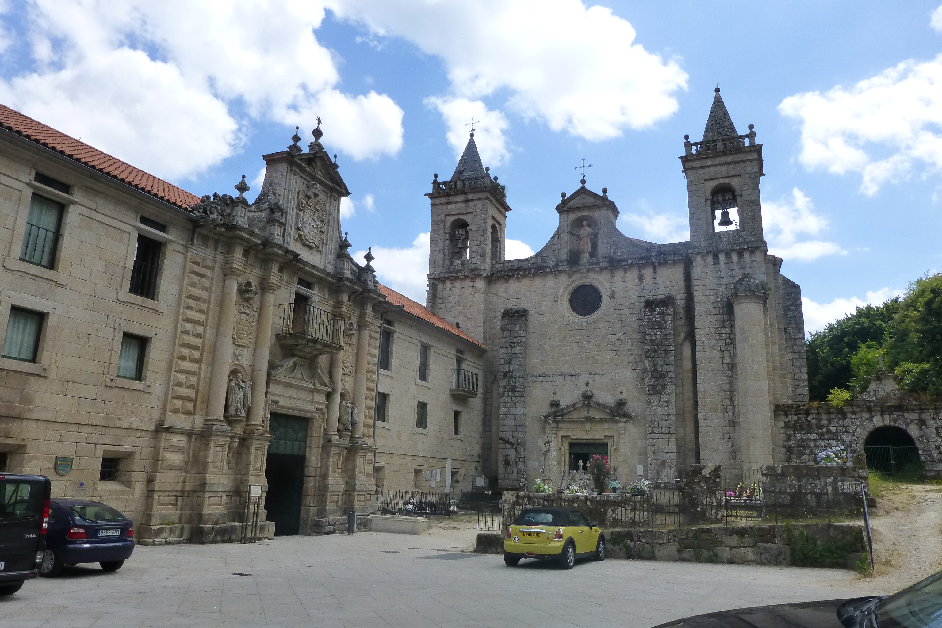 Fachadas principales de la iglesa y el Monasterio de santo Estevo de Ribas de Sil. Ourense Galicia.